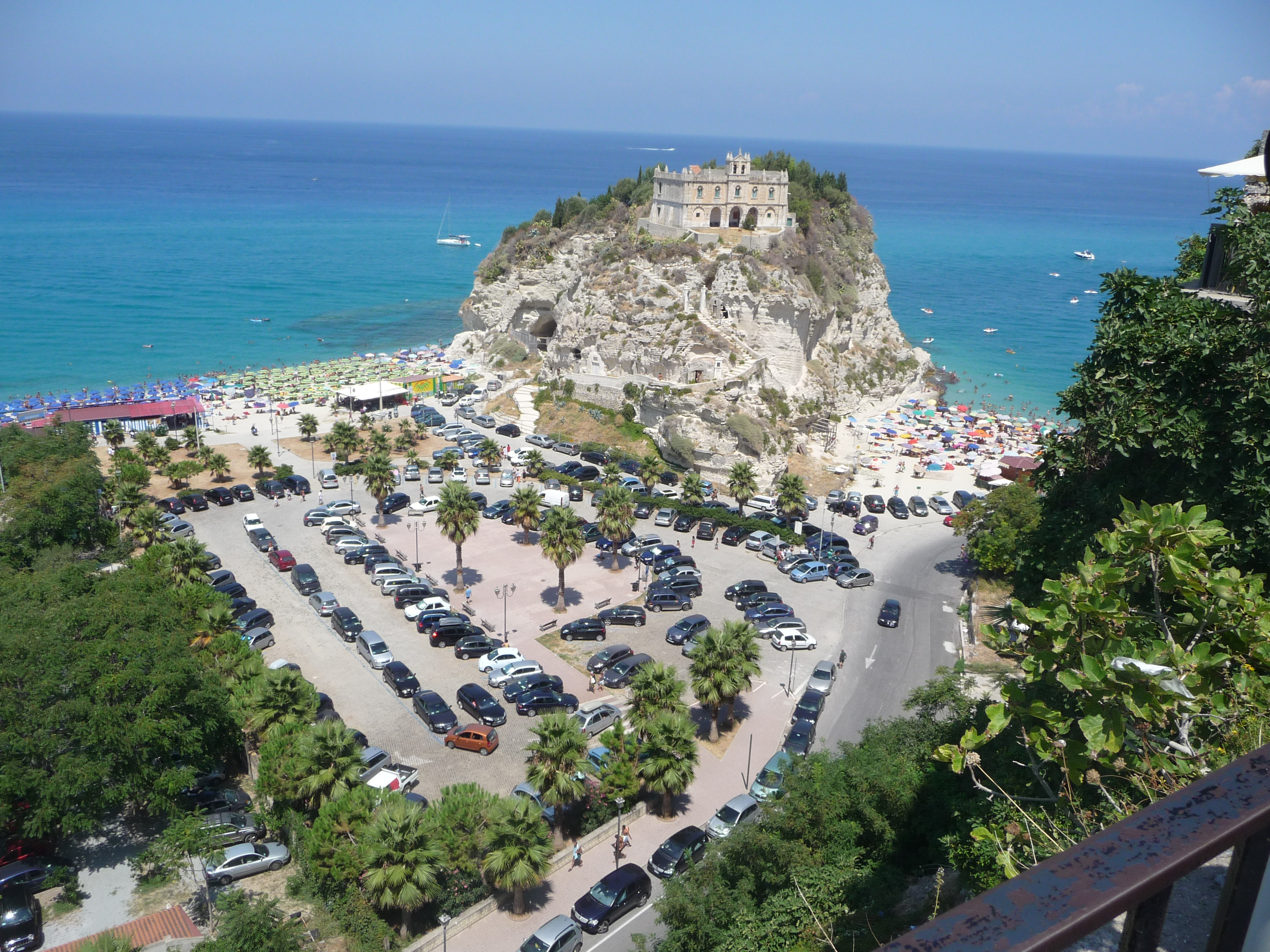 Chiesa di Tropea e parcheggio 2009